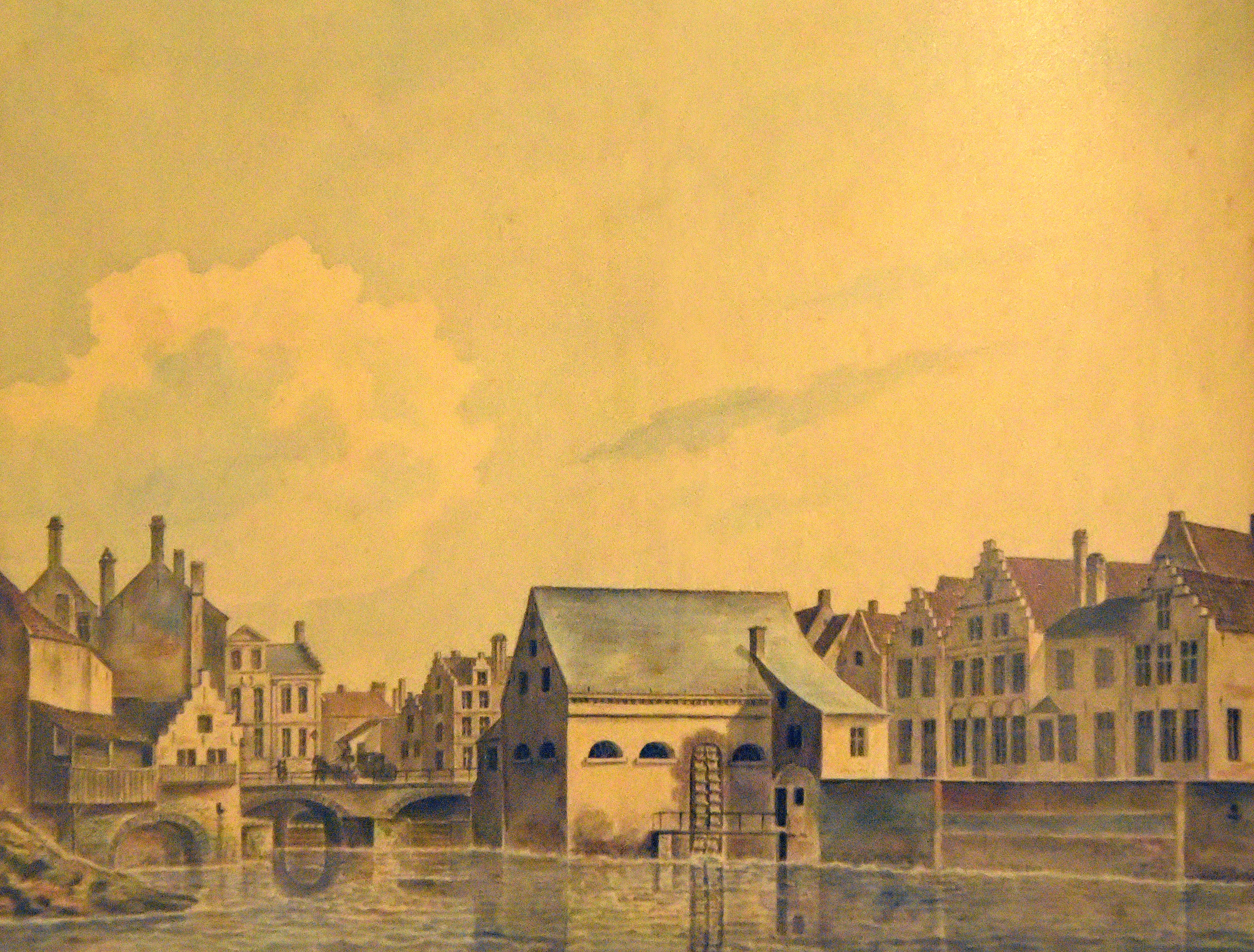 Jean-Baptiste Wynantz (1795-na 1821) - Watermolen op de Nederschelde - Gent